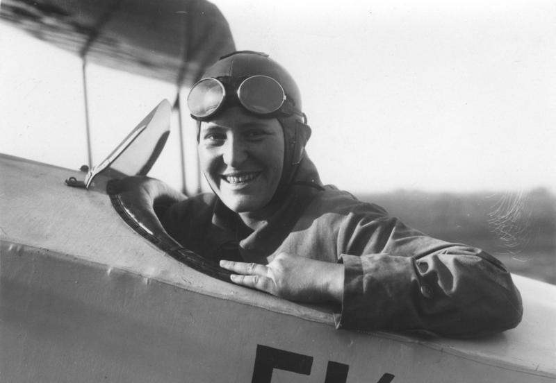 Marga von Etzdorf Marga v. Etzdorf 32245-30 [Porträt Marga von Etzdorf, in einem Flugzeug sitzend] Abgebildete Personen: Etzdorf, Marga von: 1907-1933; Kunstfliegerin, Deutschland (GND 12355800X)